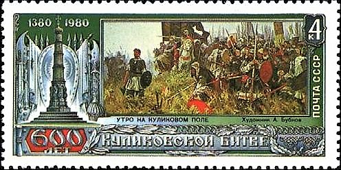 Почтовая марка СССР. 1980. А. Бубнов. Утро на Куликовом поле. Номер в каталоге ЦФА 5106